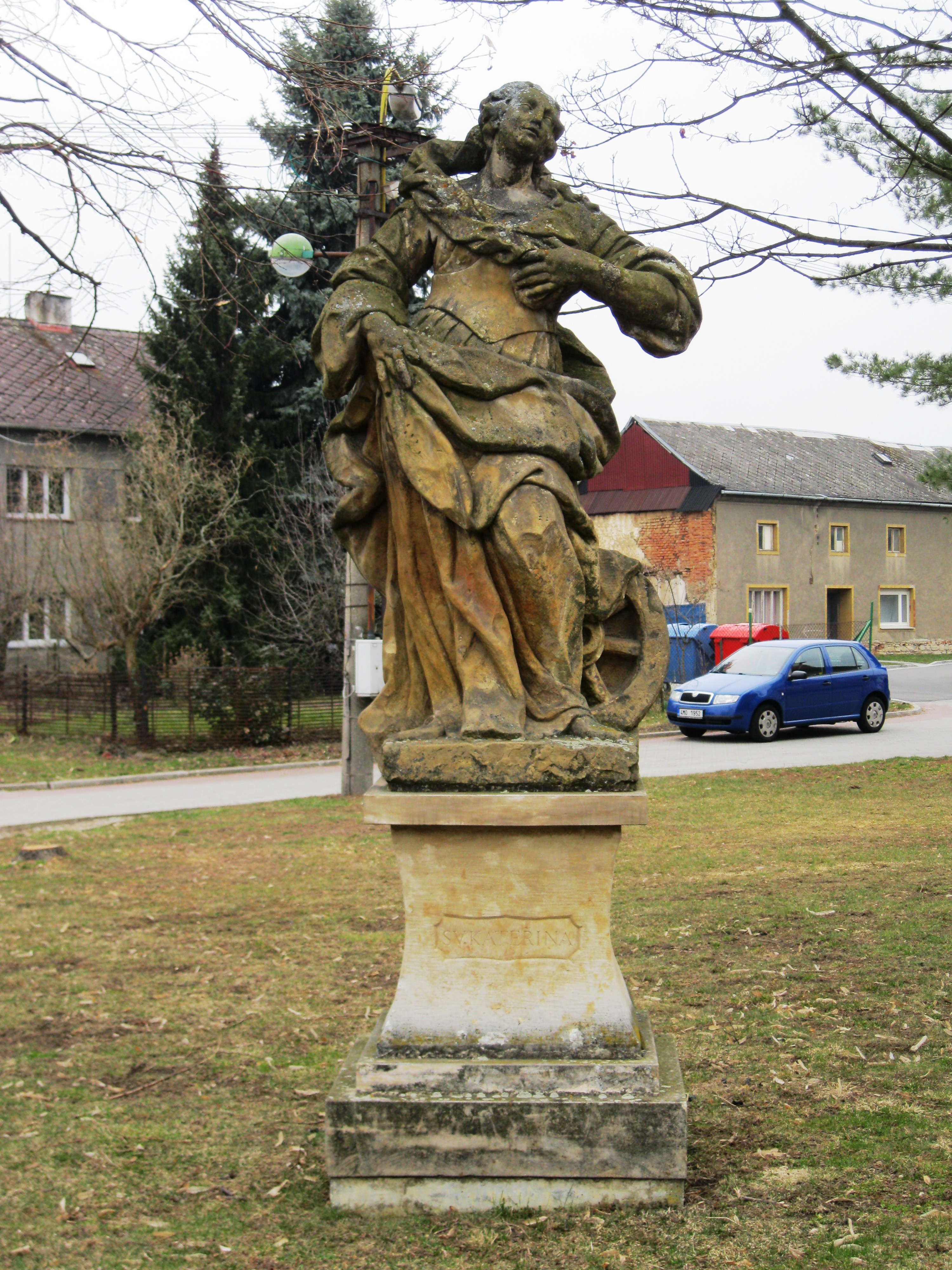 Sochy sv. Václava a sv. Kateřiny (Grygov), u kaple sv. Jana Nepomuckého, Grygov